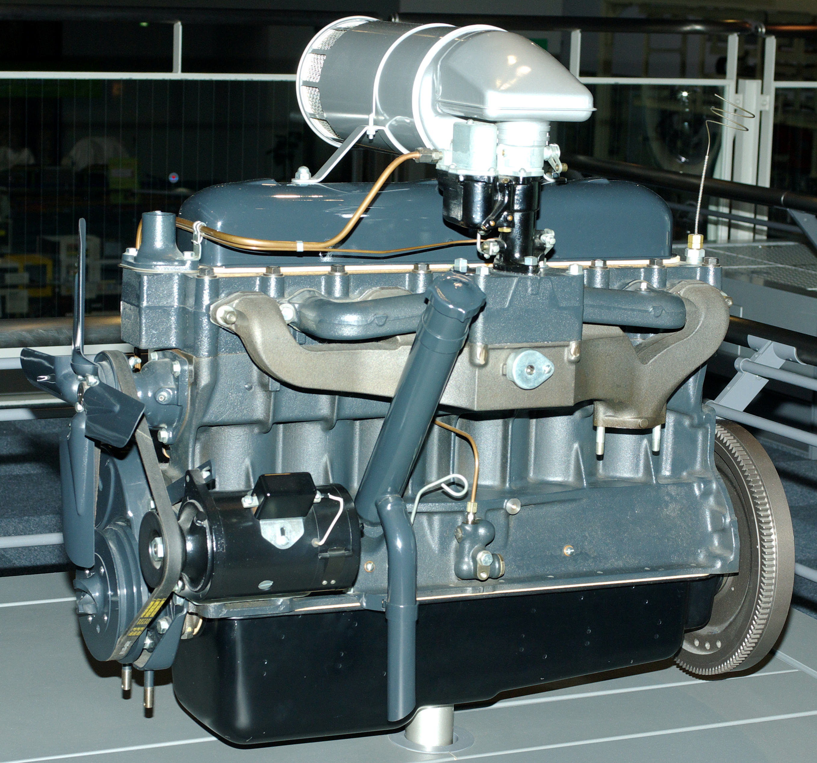 1935年製トヨタA型エンジン。レプリカ。トヨタ産業技術記念館蔵。